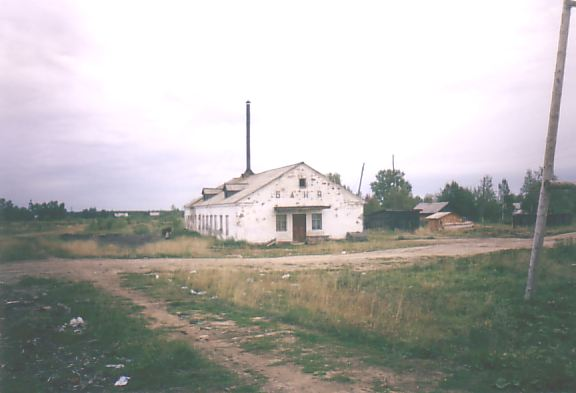 Разобранный участок пути между посадочной платформой и бывшей главной станцией. Вид на север, в сторону посадочной платформы. Здание общественной бани.